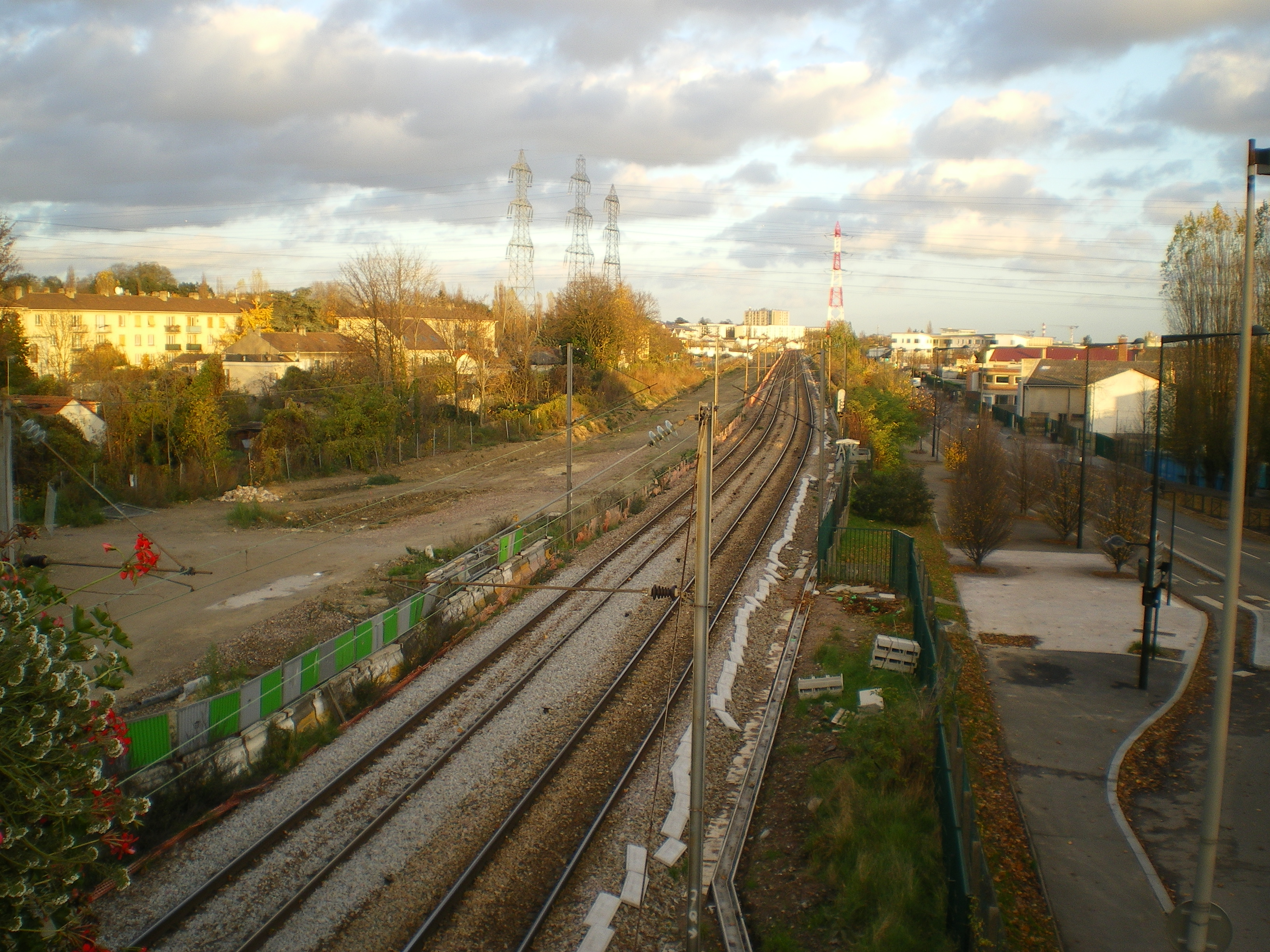 Travaux de la tangentielle nord novembre 2012